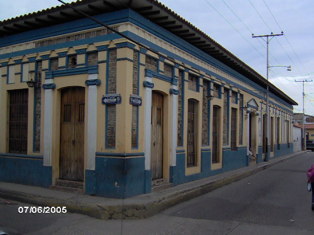 Carrascosa